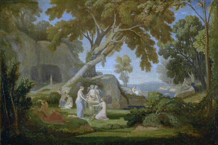 Claude-Félix-Théodore Caruelle d'Aligny : L'Enfance de Bacchus